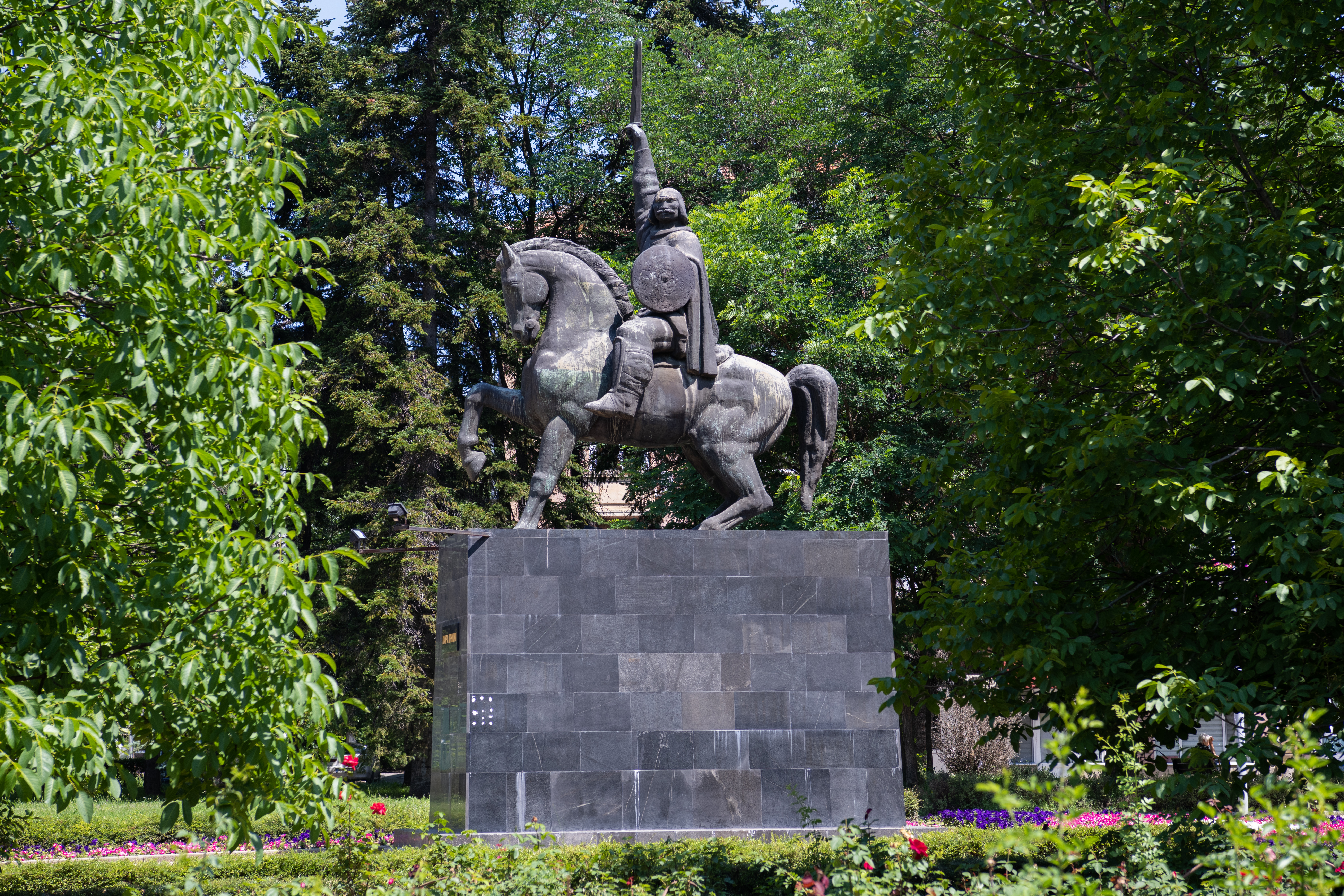 Снимката документира паметника на Кракра Пернишки в град Перник